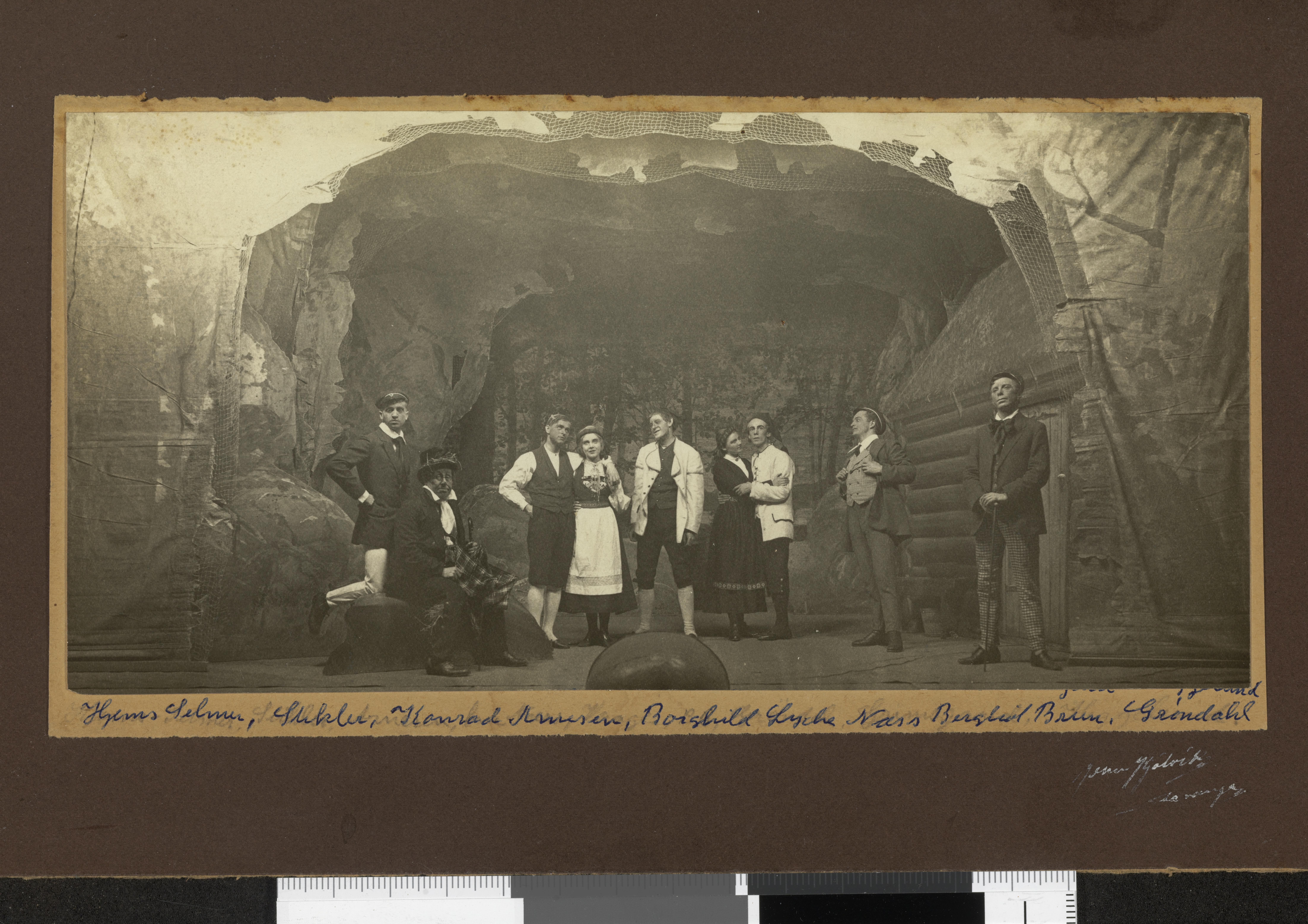 Bildet er hentet fra Nasjonalbibliotekets bildesamling Depicted person: Arnesen, Conrad Depicted person: Heggelund, Oscar Depicted person: Bruu, Bergliot Depicted person: Næss, Borghild Lyche Depicted person: Stikler, Albert Depicted person: Selmer, Ågot Gjems